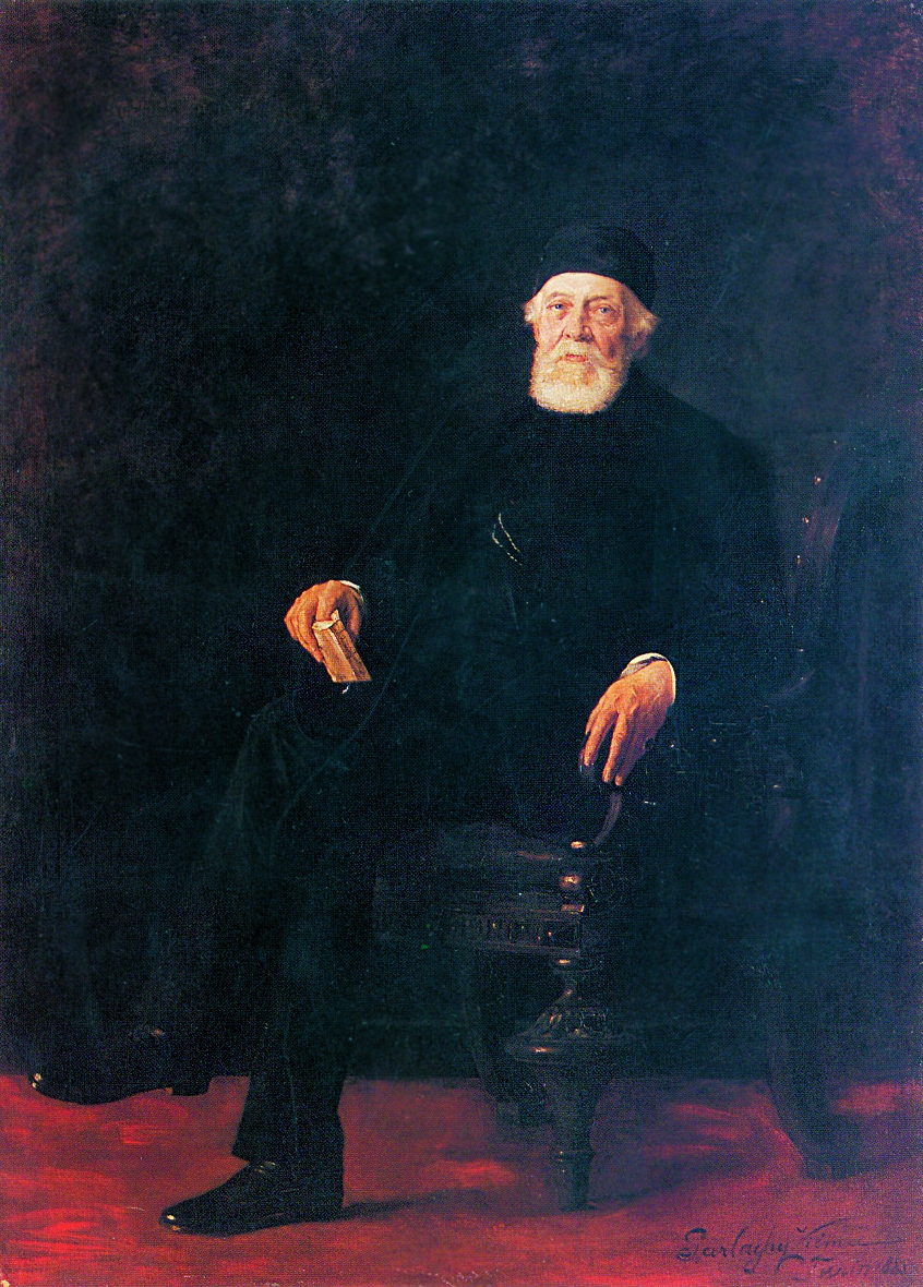 Kossuth Lajos portréja. Parlaghy Vilma festménye (1885)